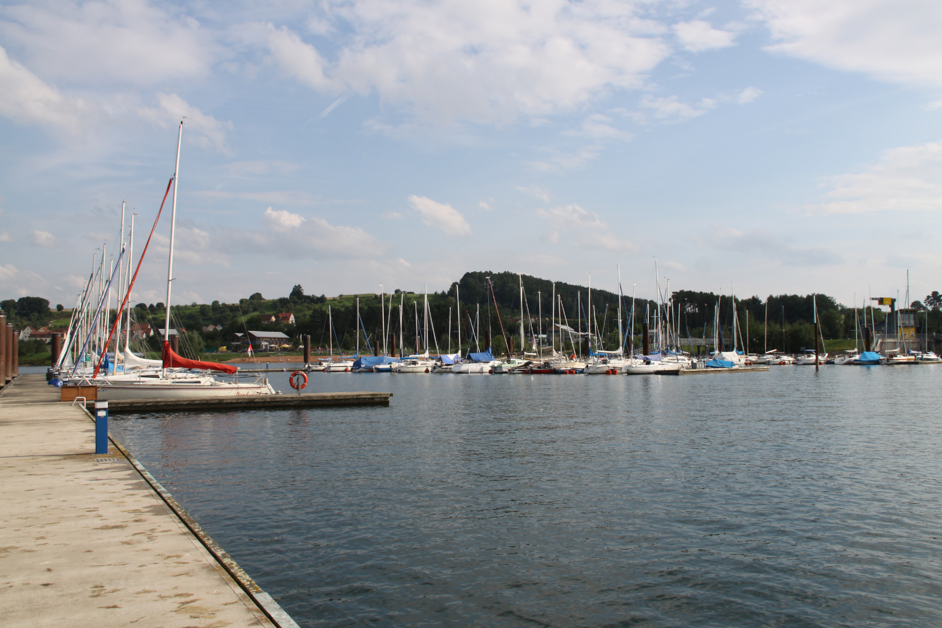 Hafen Ramsberg